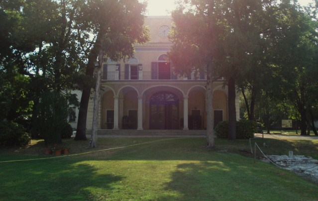 Vista forontale di Villa Badia dal viale principale, con scavi archeologici sulla destra